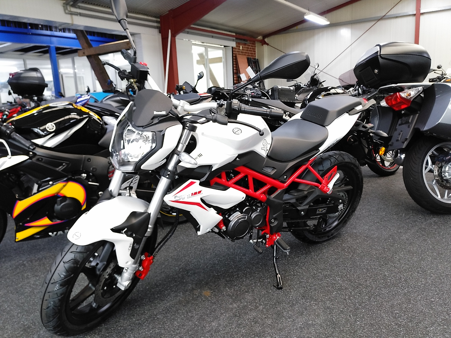 Leichtkraftrad Benelli BN 125, Modelljahr 2020, im Ausstellungsraum eines Motorradhändlers in Lingen.